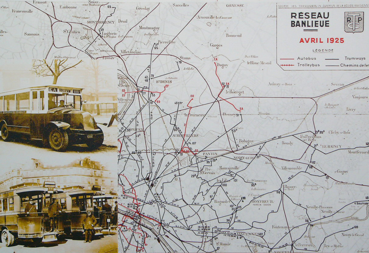 Plan du réseau STCRP en 1925